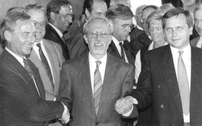 ADN-Bernd Settnik-31.8.90 Berlin: Einigungsvertrag- Der Einigungsvertrag über den Beitritt der DDR zur Bundesrepublik Deutschland wurde im Ostberliner Palais Unter den Linden unterzeichnet. Nach dem feierlichen Akt der Händedruck zwischen den Verhandlungsführern, Staatssekretär Dr. Günther Krause (r.) und Bundesinnenminister Wolfgang Schäuble (l.), und dem DDR-Ministerpräsidenten Lothar de Maiziere (M.).